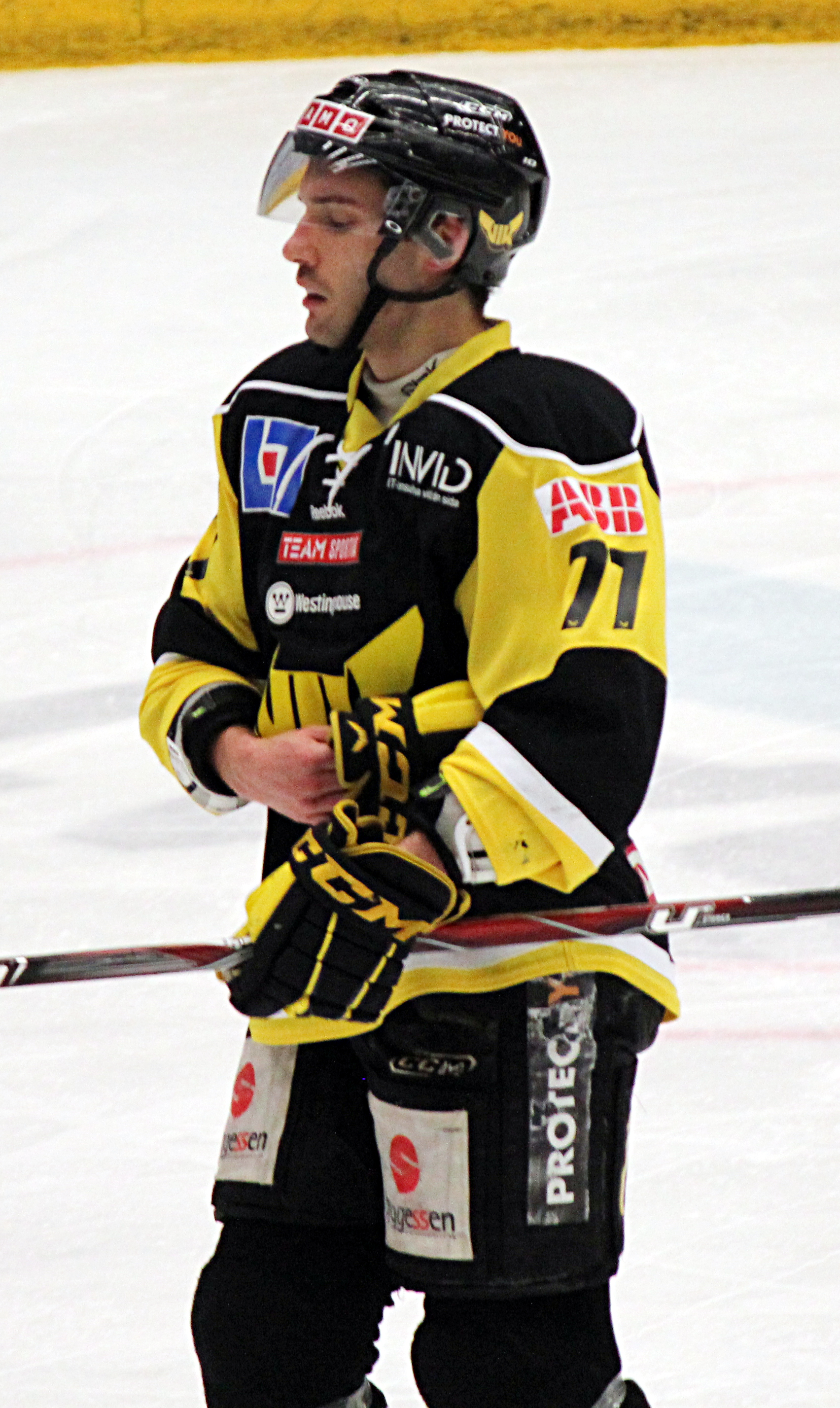 Alexander Ribbenstrand för VIK Västerås HK mot Leksands IF i Tegera Arena 29 januari 2011.